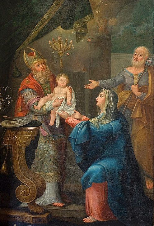 Circoncisione di Gesù, olio su tela, firmata e datata, Chiesa di San Nicola, Bassiano